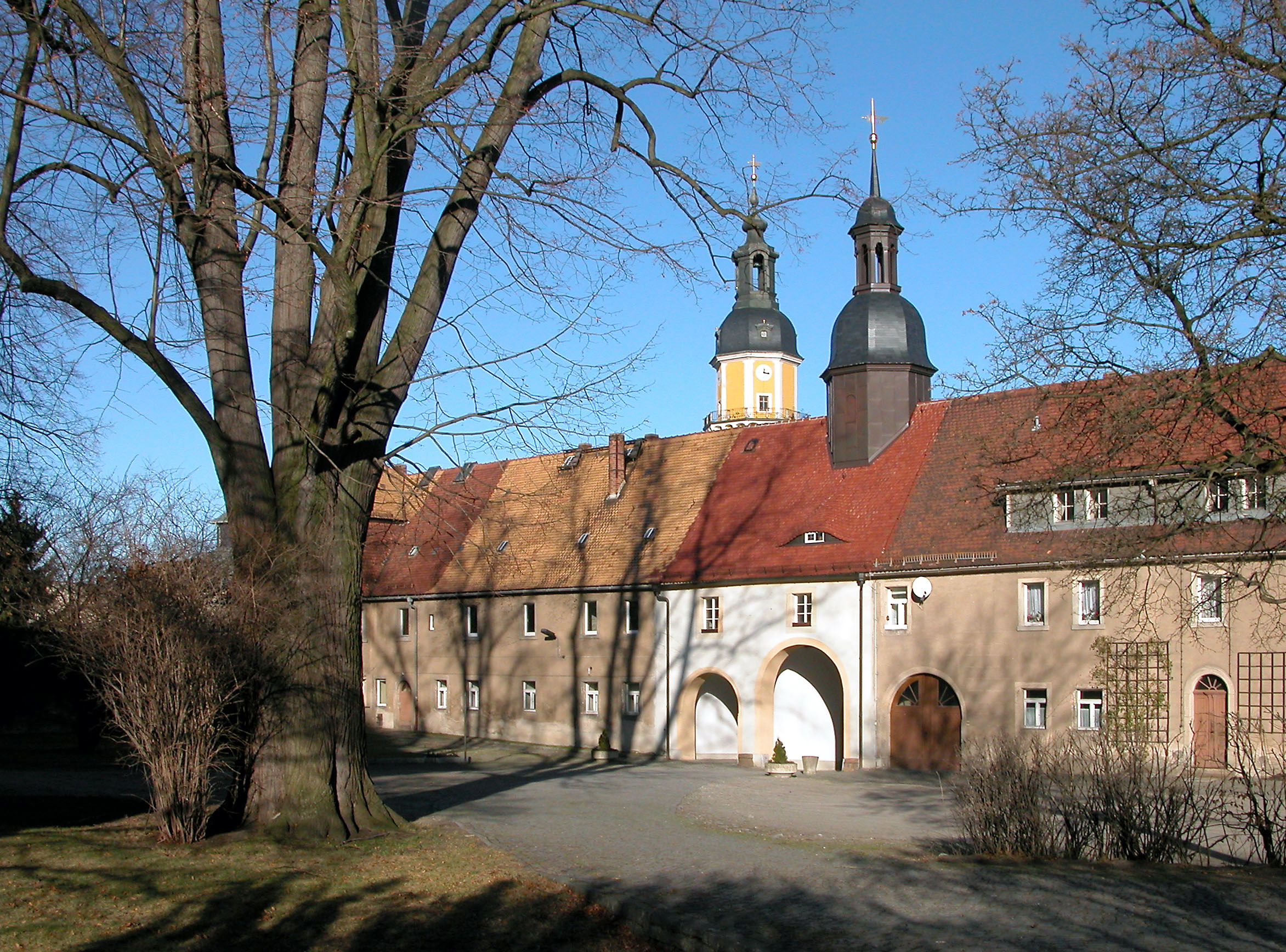 08.01.2005 01936 Königsbrück: Barockschloß (um 1700. In der DDR Krankenhaus. Torhaus zum Schloßareal, Hofseite. Dahinter die Stadtkirche [DSCN5718.TIF]20050108410DR.JPG(c)Blobelt